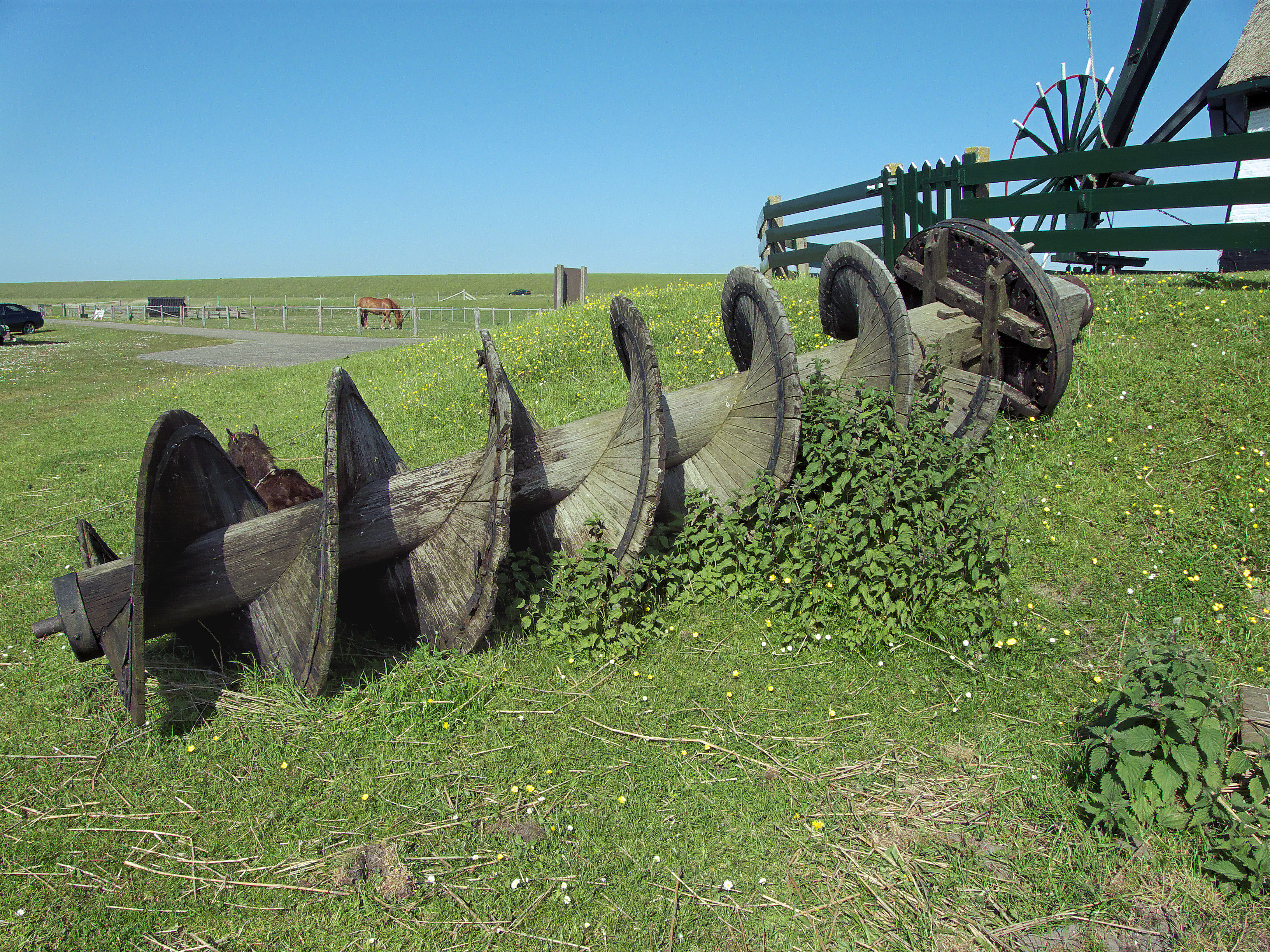 Molen Het Noorden, Texel, houten vijzel